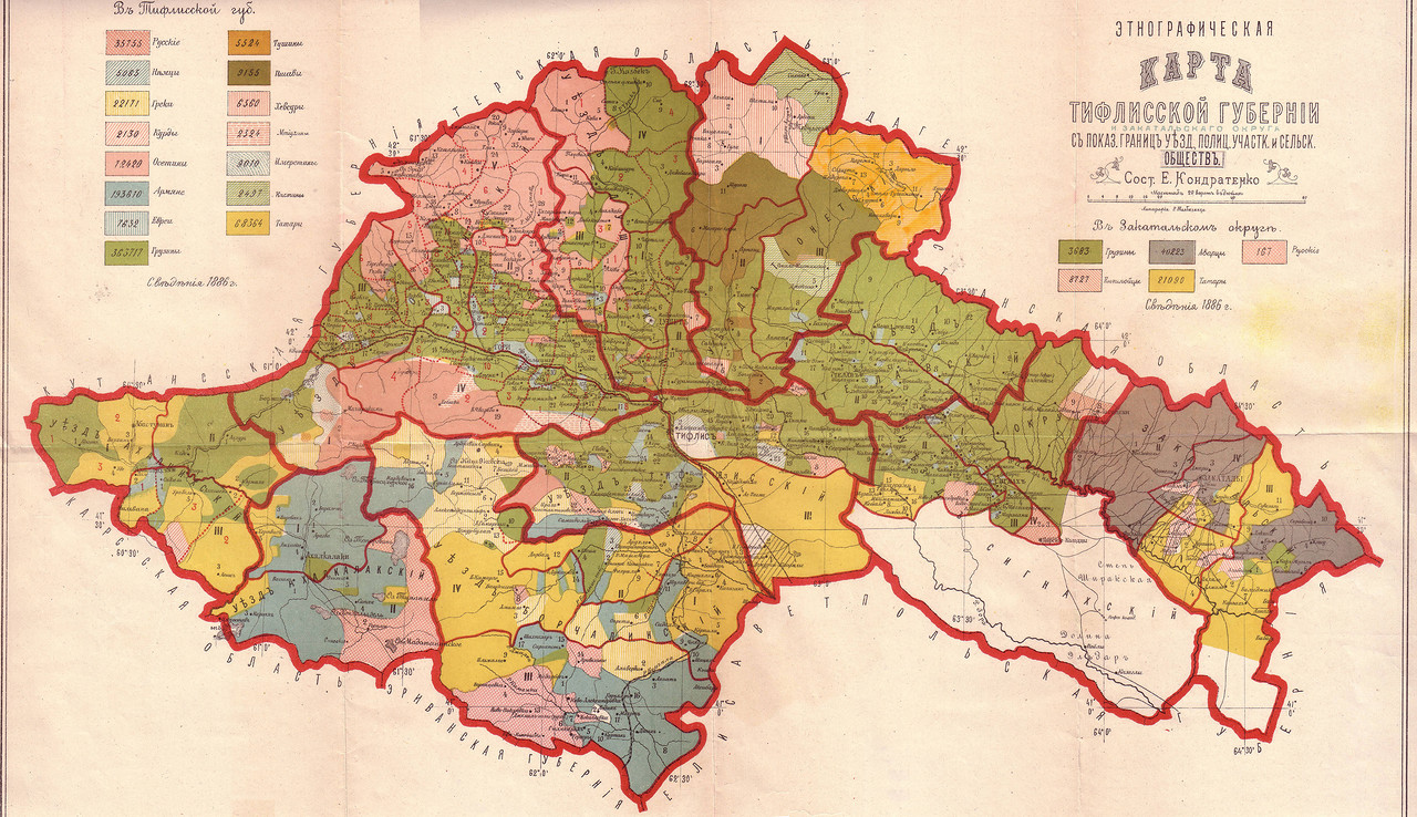 Карта этнического состава населения Тифлисской губернии по спискам 1886 года